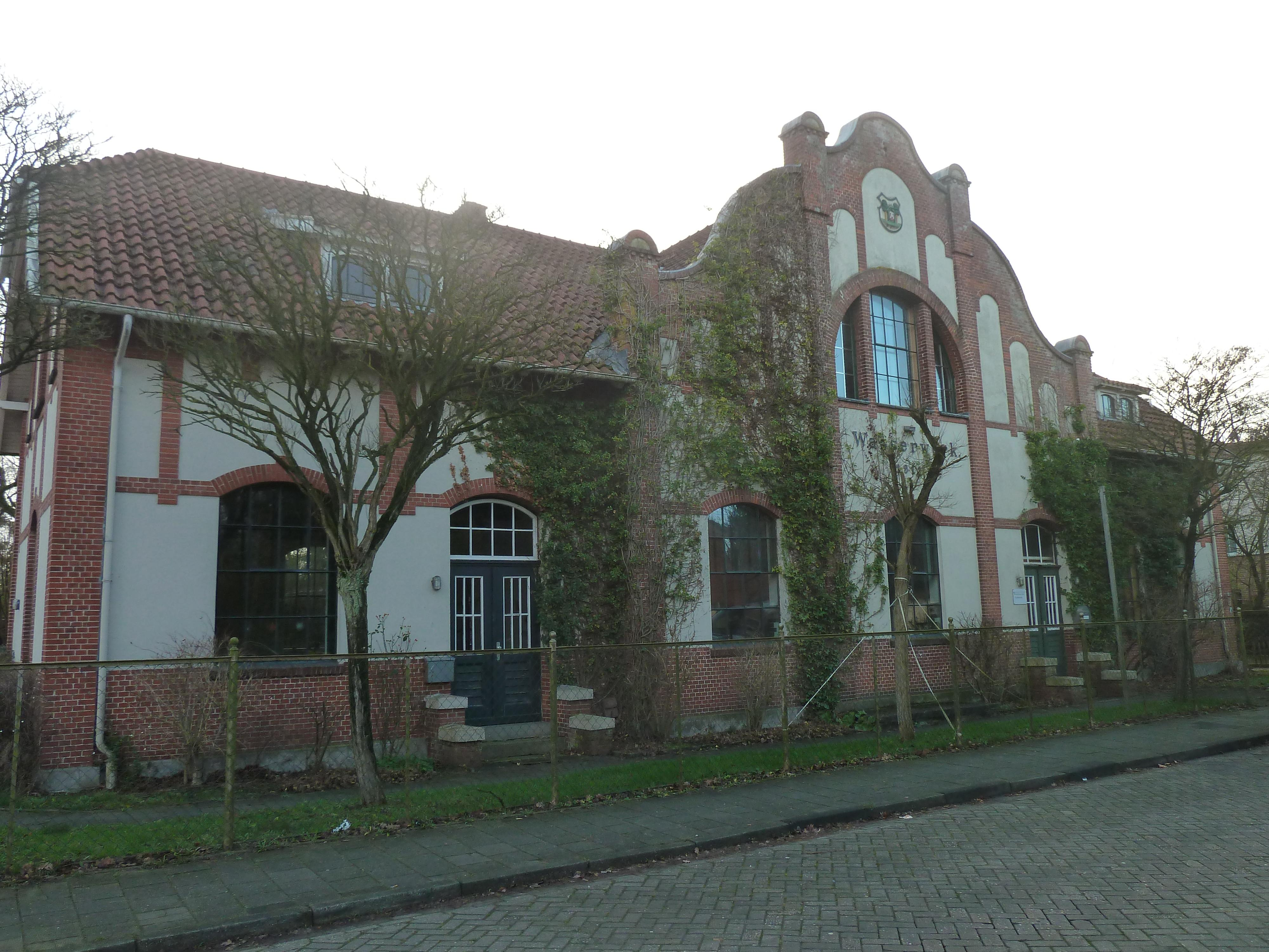 Denkmalgeschütztes Haus, Wesserwerksweg 10 (ehemaliges Wasserwerk), Aurich